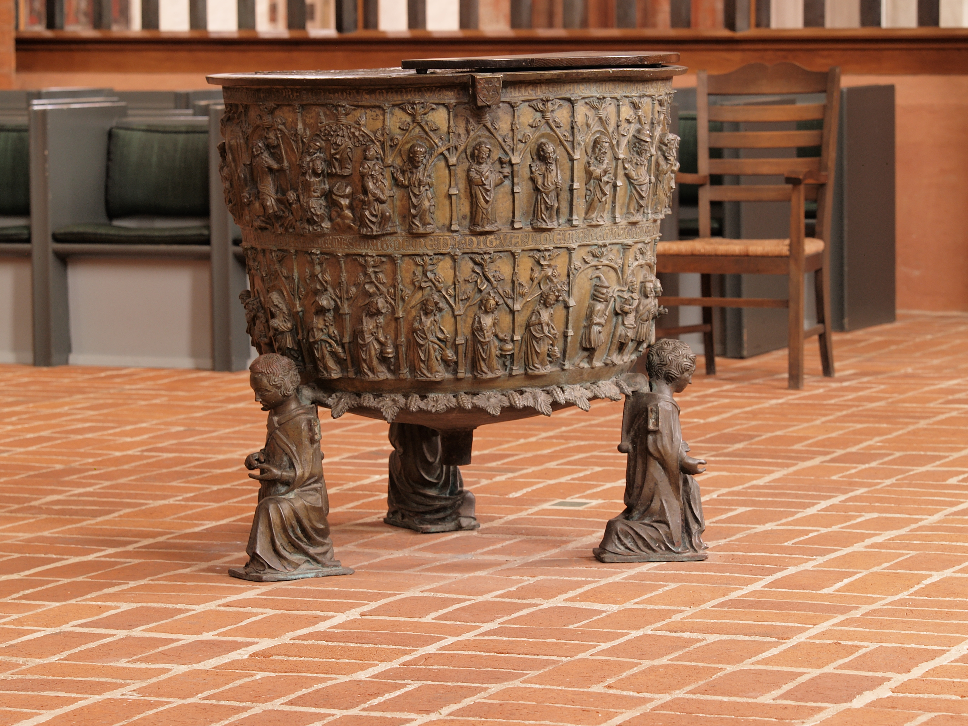 Das Taufbecken in der Marienkirche in Lübeck aus südlicher Richtung